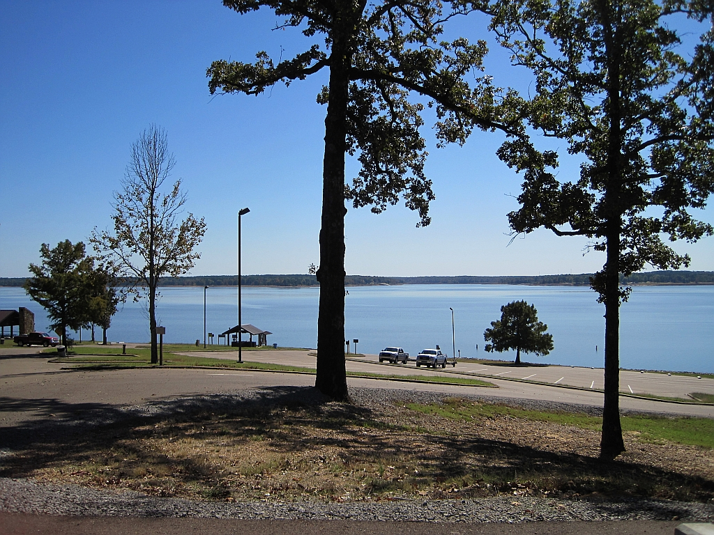 Enid Lake, Mississippi